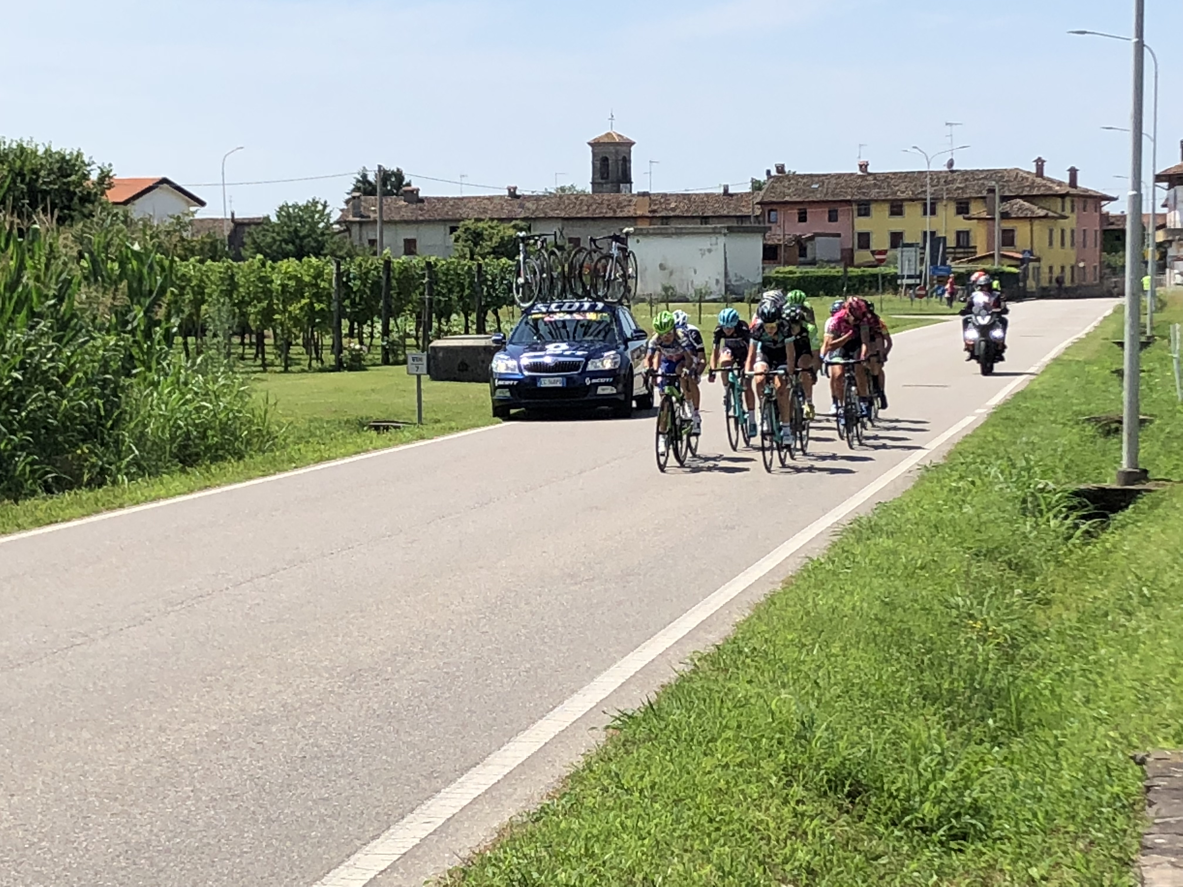 Giro Rosa 2018